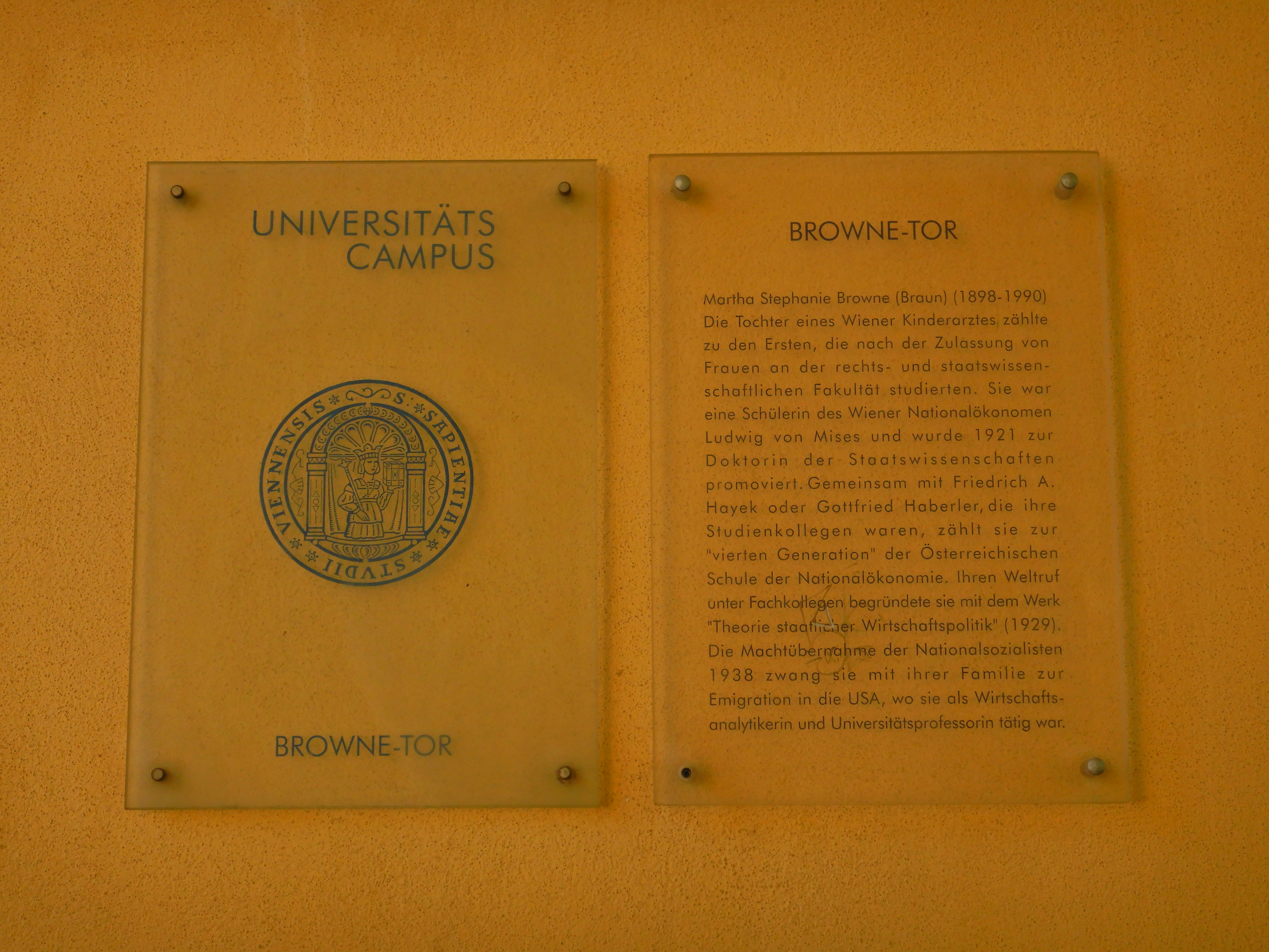 Gedenktafel für Martha Steffy Browne (Wien, Alser Straße 2 - 4)